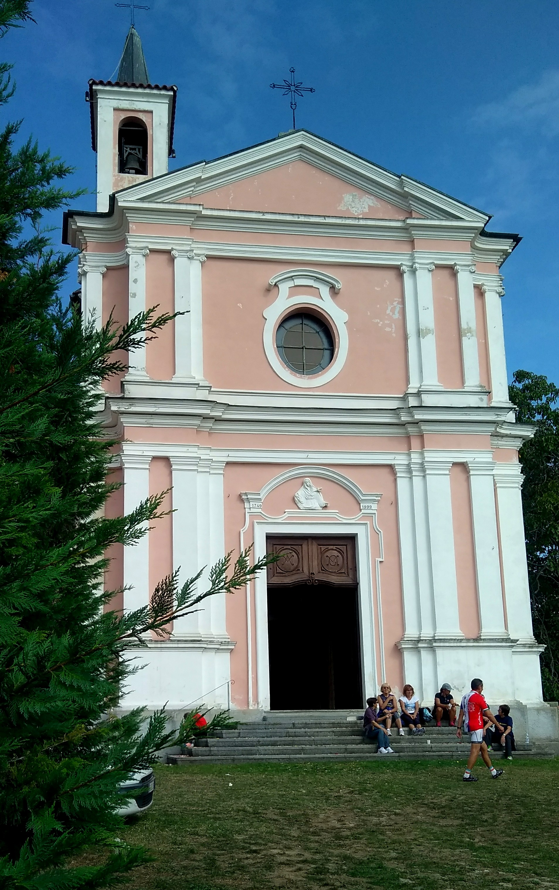 Cuceglio (TO) santuario dalla Beata Vergine Addolorata